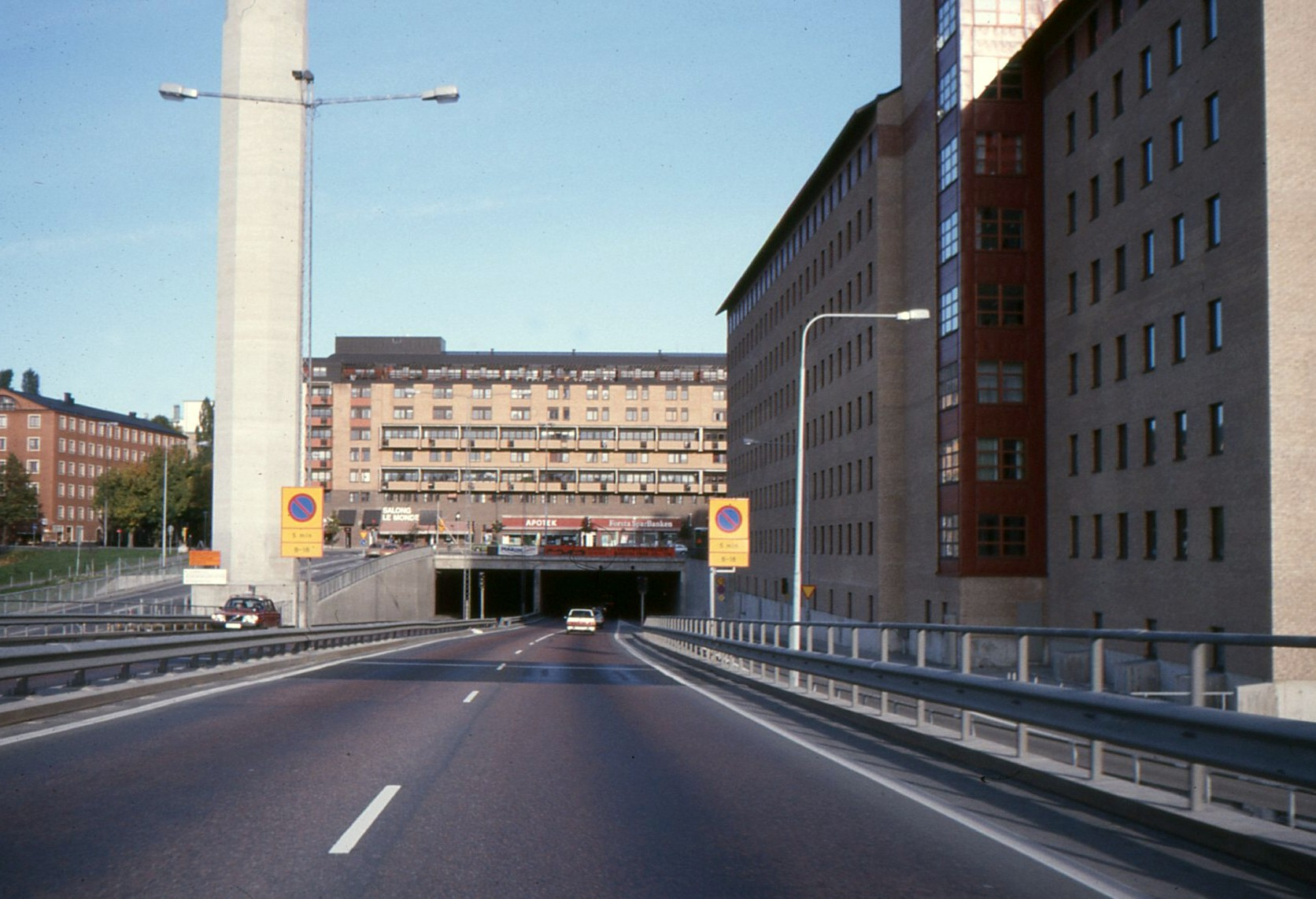 körning på nya Johanneshovsbron och in i Söderledstunneln 1986